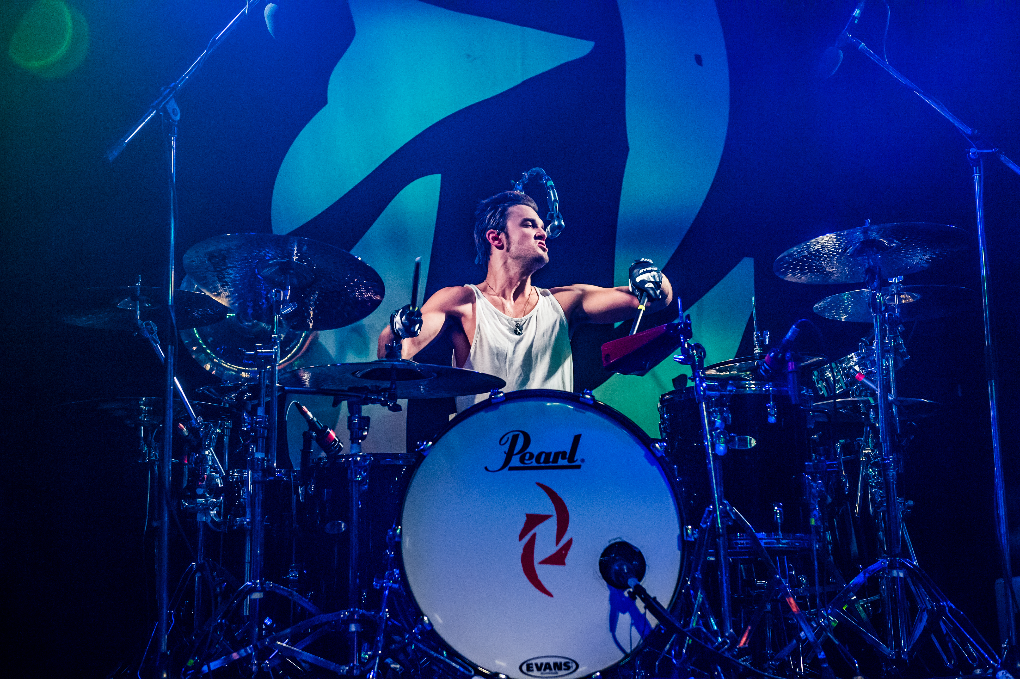 'Halestorm Into the Wild Life Tour - Bochum Zeche'